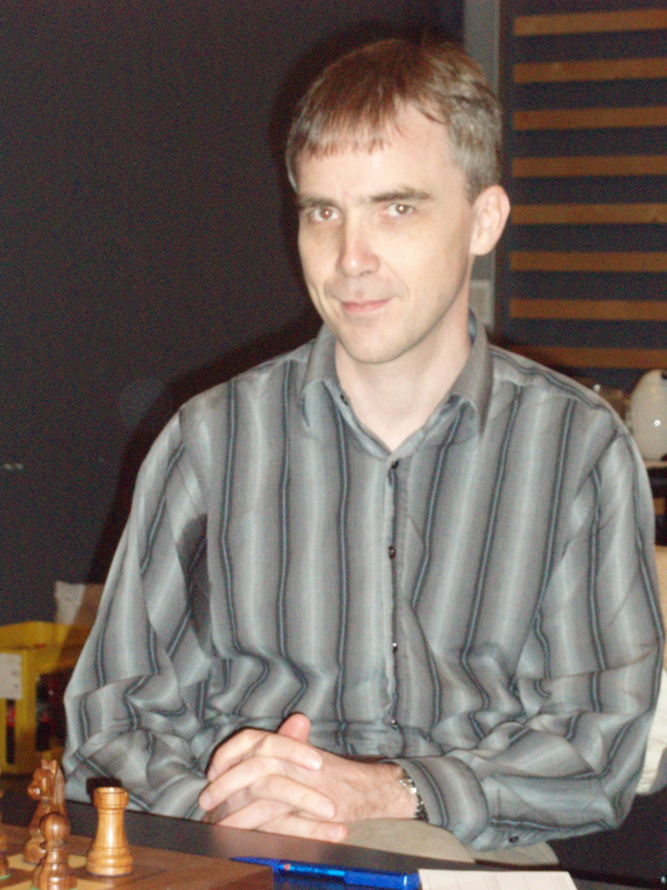 Berge Østenstad, Chess Grandmaster, at the Norwegian Chess Championship at Hamar 2007 Berge Østenstad, stormeister i sjakk, NM på Hamar 2007